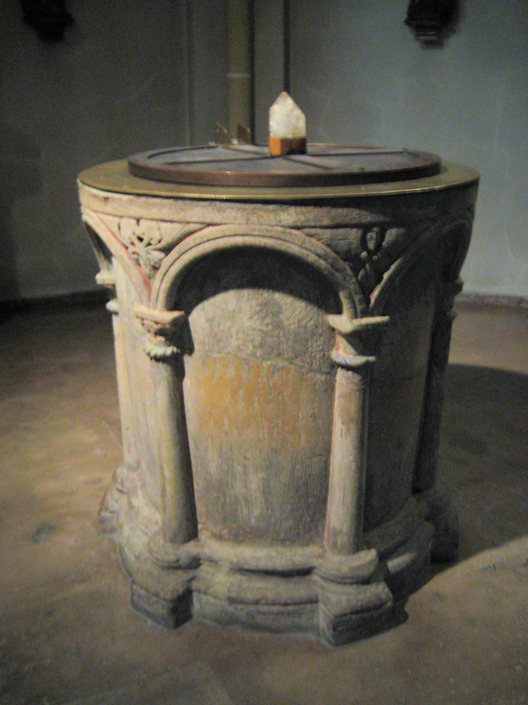 Taufe Alte St. Alexanderkirche in Wallenhorst jetzt in der Neuen St. Alexanderkirche